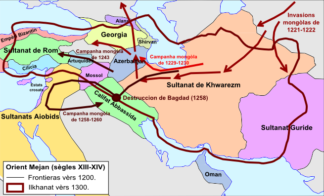 Evolucion de l'Orient Mejan durant lei sègles XIII e XIV.